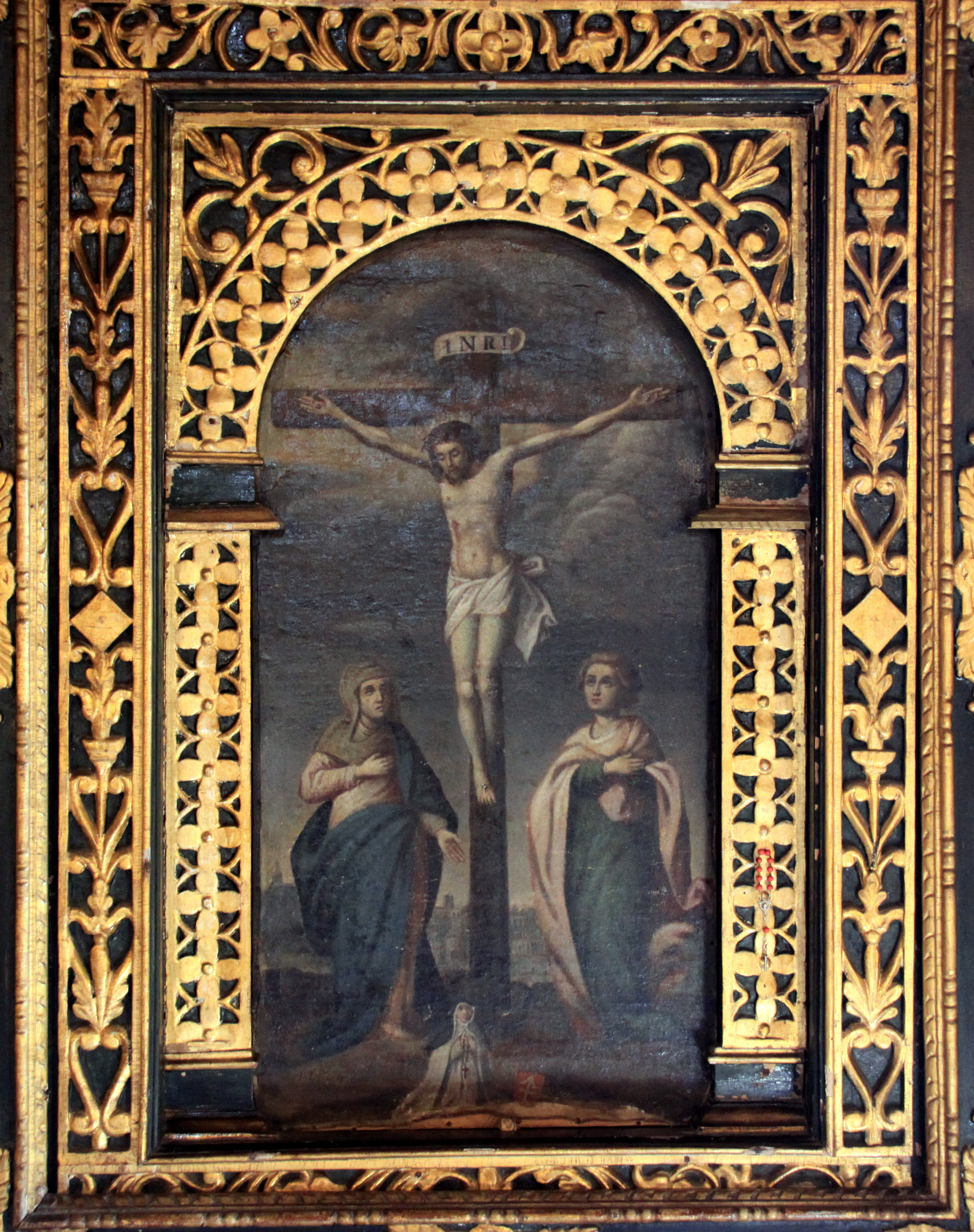 Chotelek, kościół św. Stanisława Biskupa - obraz na zasuwie ołtarza.